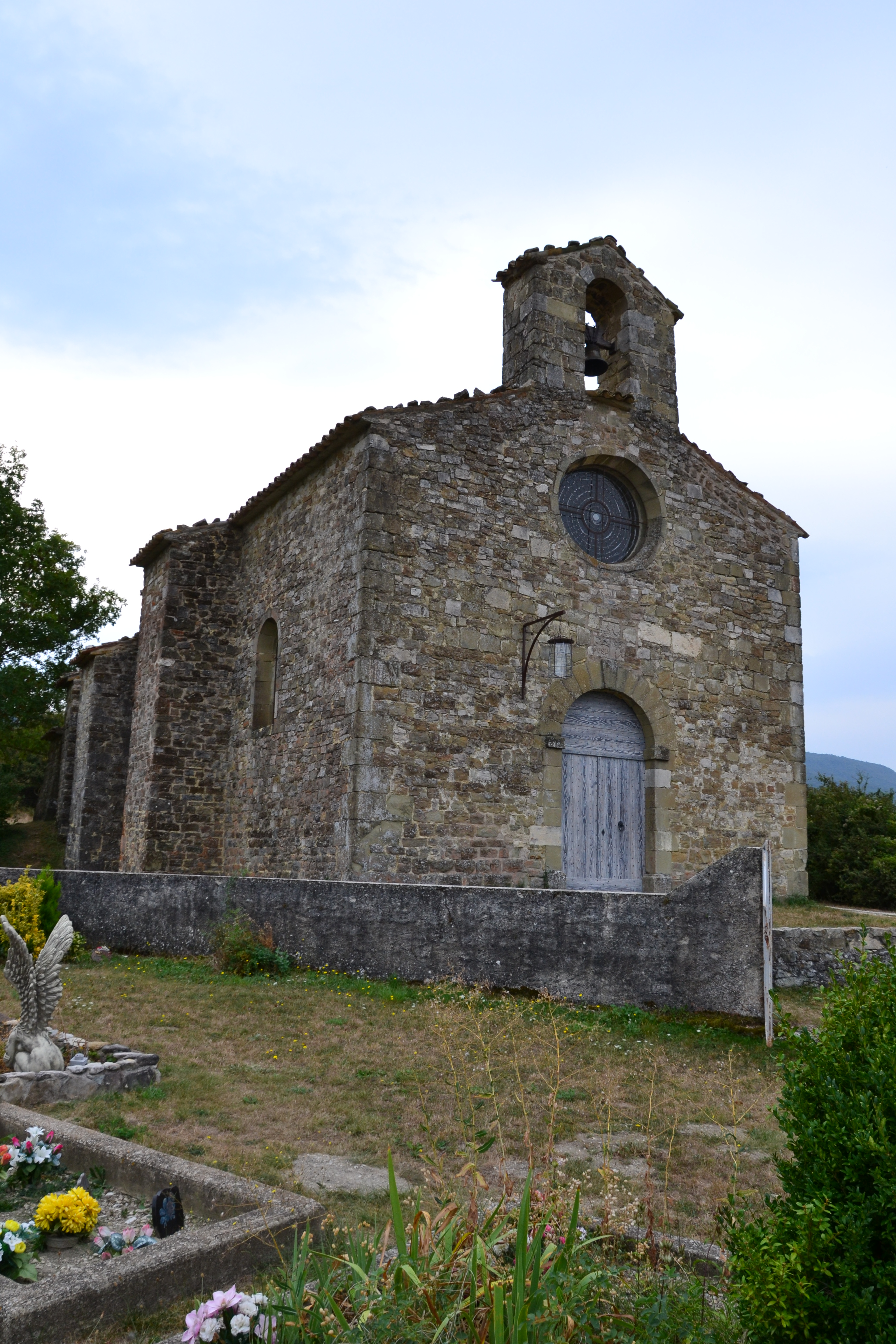 Chapelle Saint-Jean de Crupies